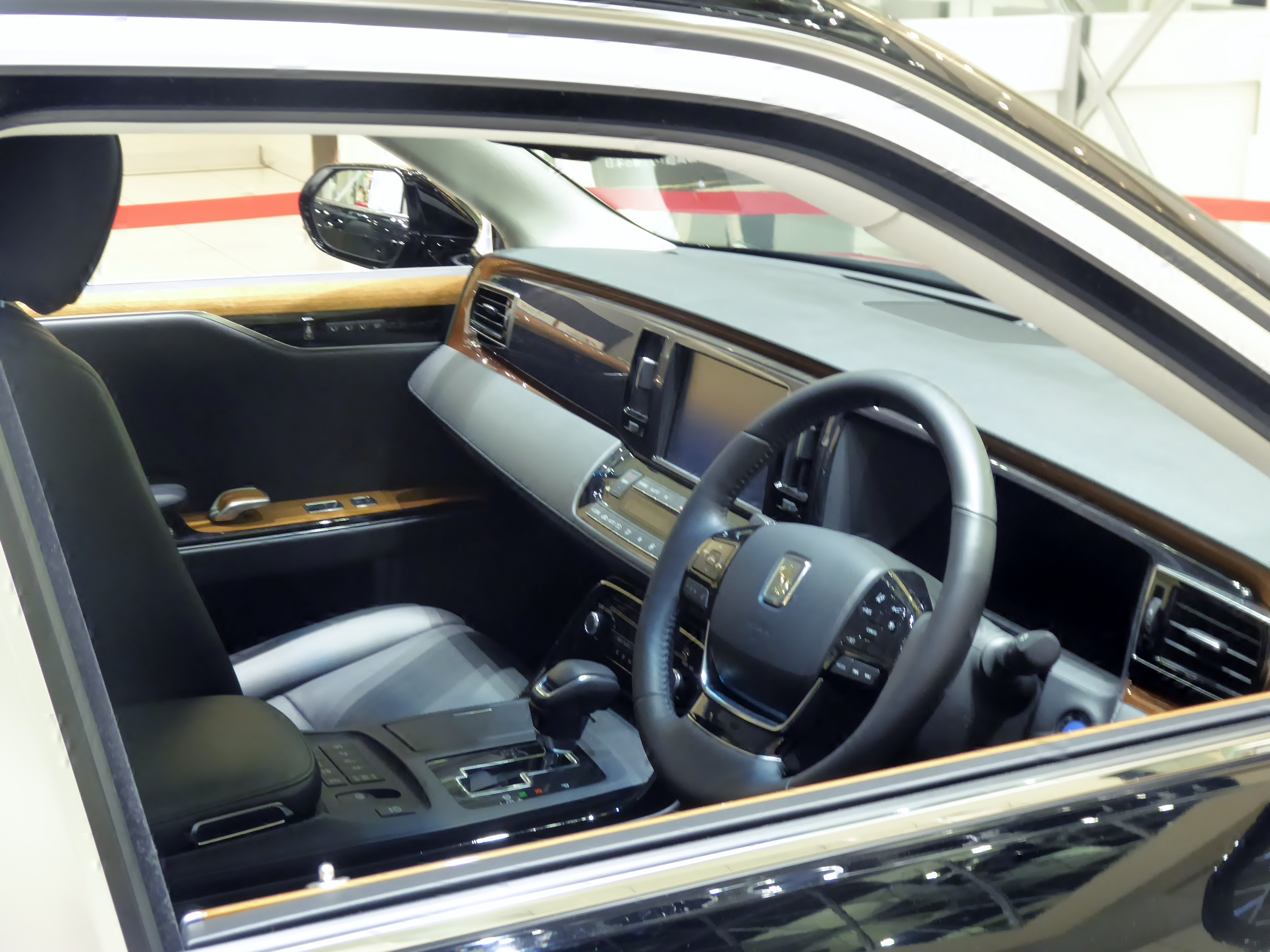 DAA-UWG60-AEXGH型トヨタ・センチュリーのインテリアを撮影。